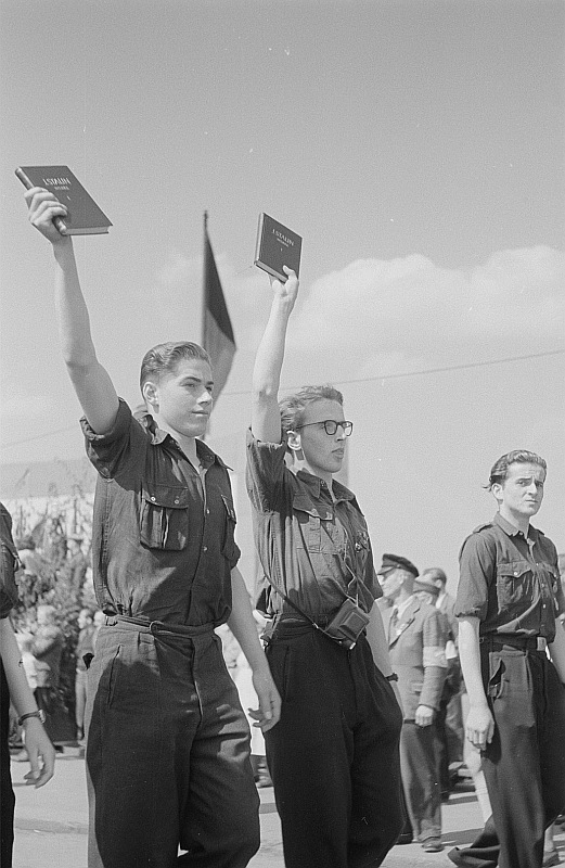 Original image description from the Deutsche FotothekMitglieder der FDJ